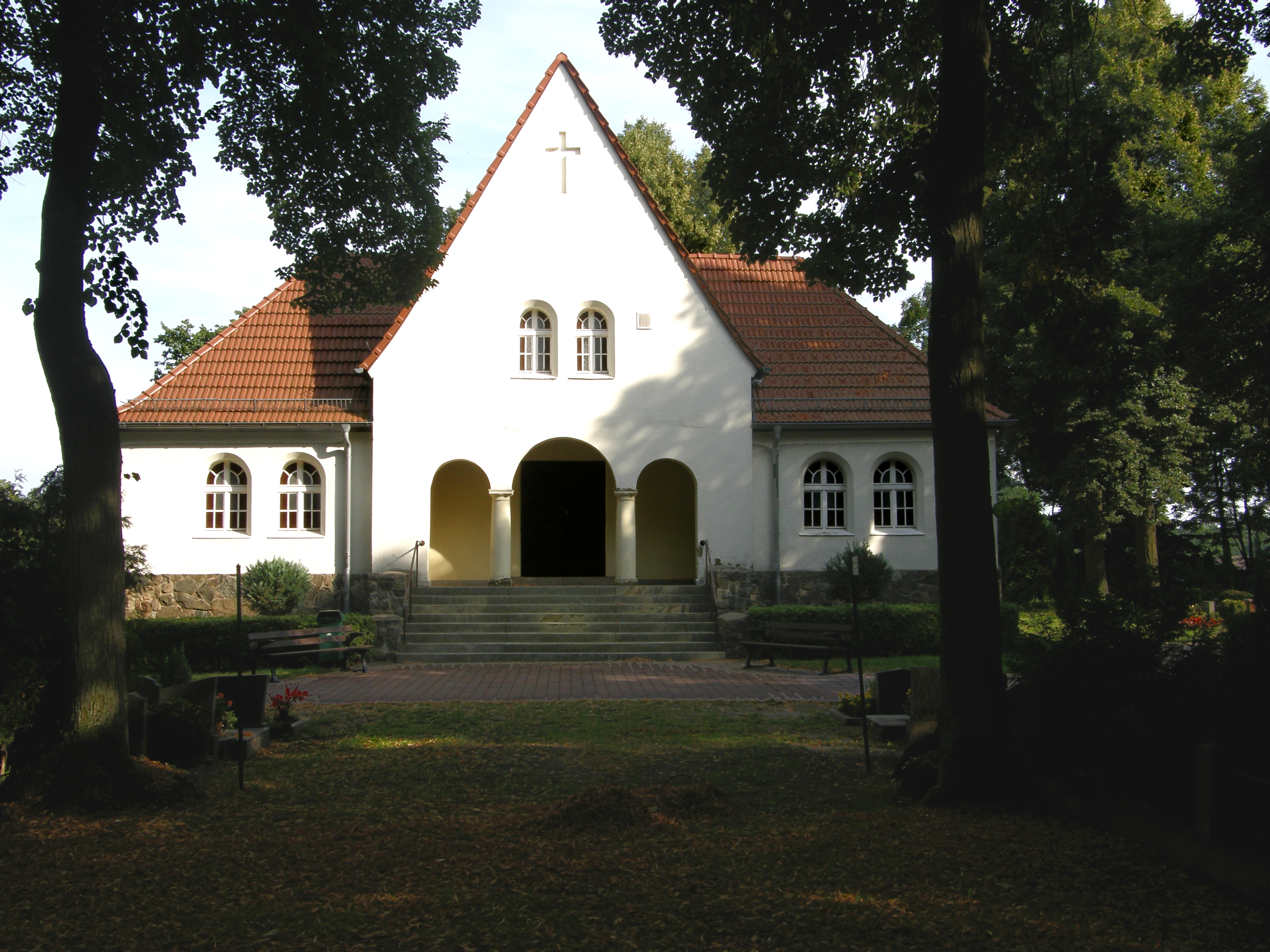 Ortsteil Wandlitz, Kapelle auf dem Friedhof